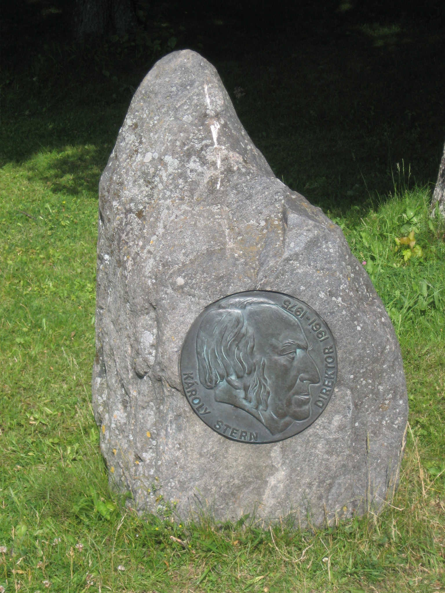 Tallinna loomaaia direktori Karoly Sterni mälestussammas